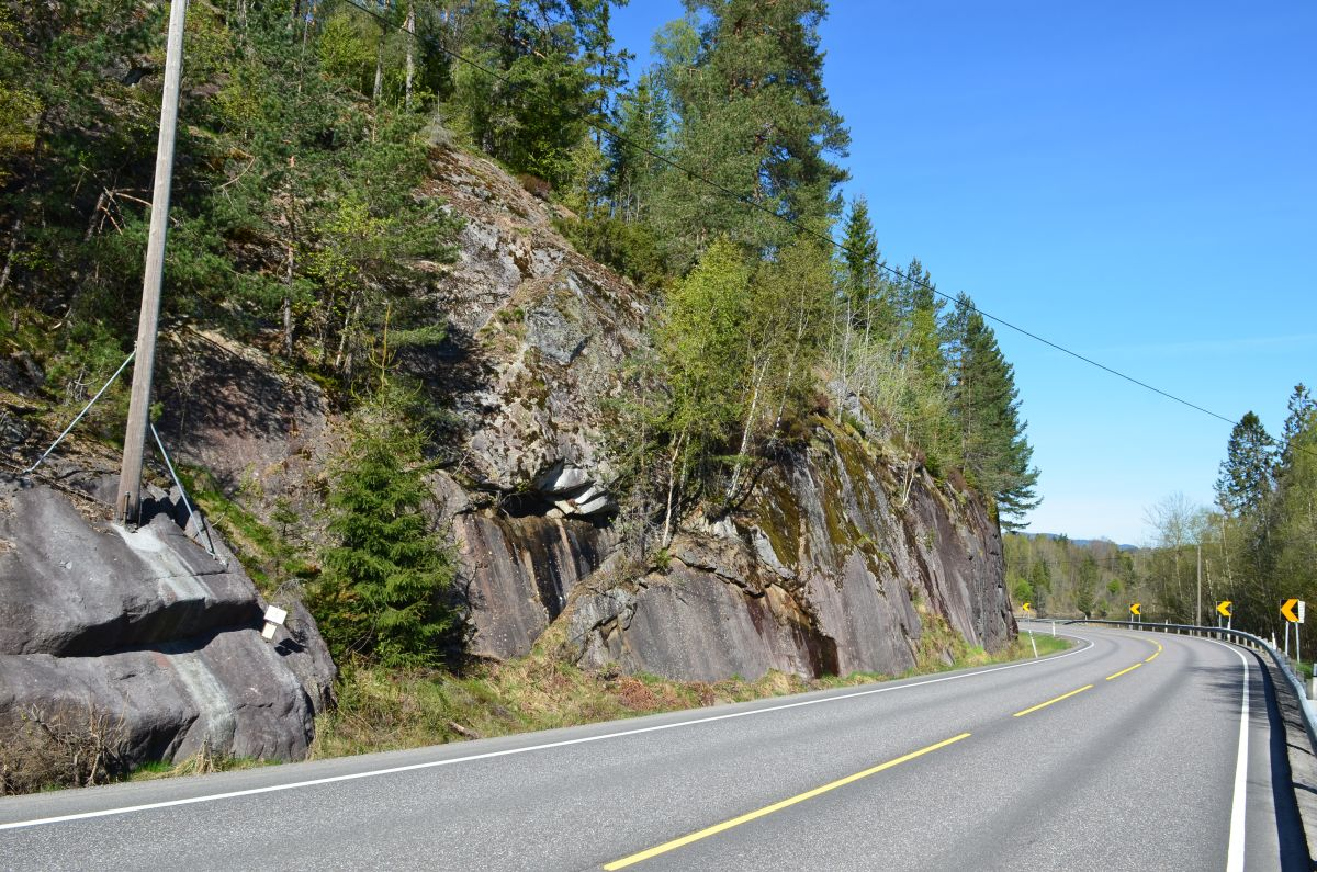 Naturminnet ligger tett inntil Lågendalsveien.